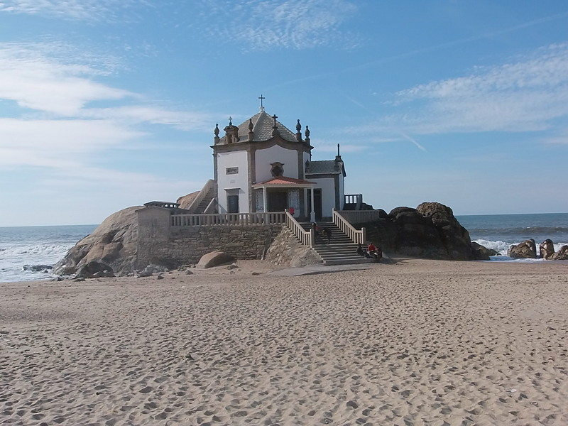 Capela localizada em Vila Nova de Gaia, Portugal